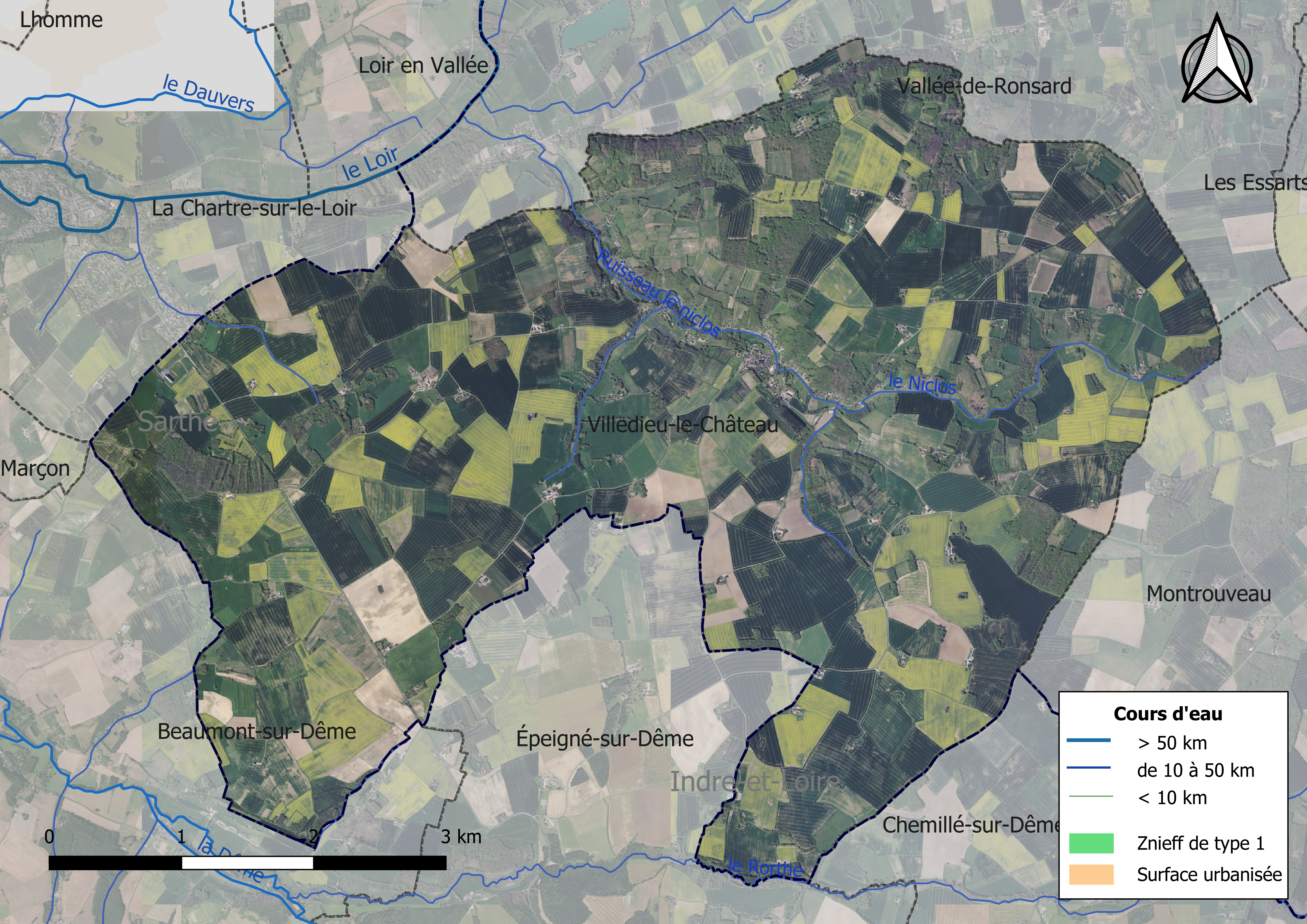 Carte orhophotogrammétrique de la commune de Villedieu-le-Château (France).